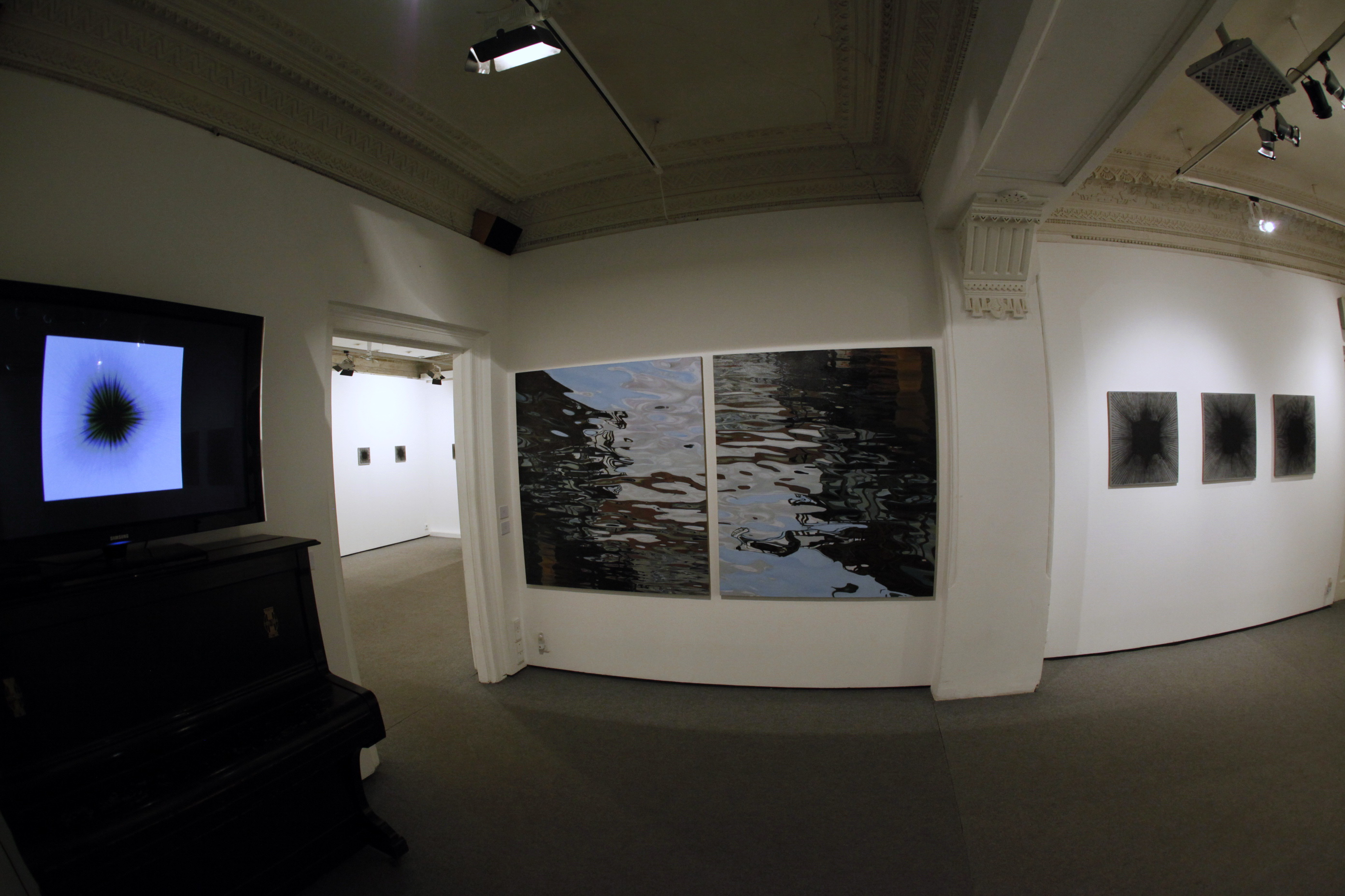 Артем Волокітін "Внутрішнє сяйво", 2013